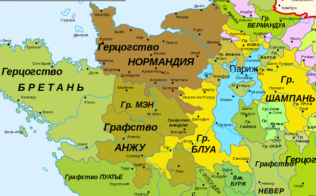 Карта Франции в 1030 г.